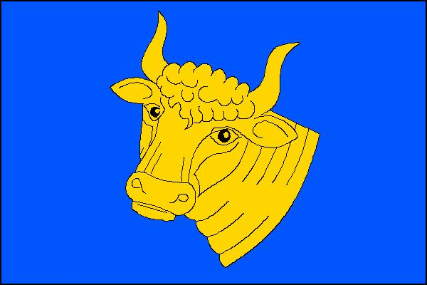 Vlajka obce Žerčice